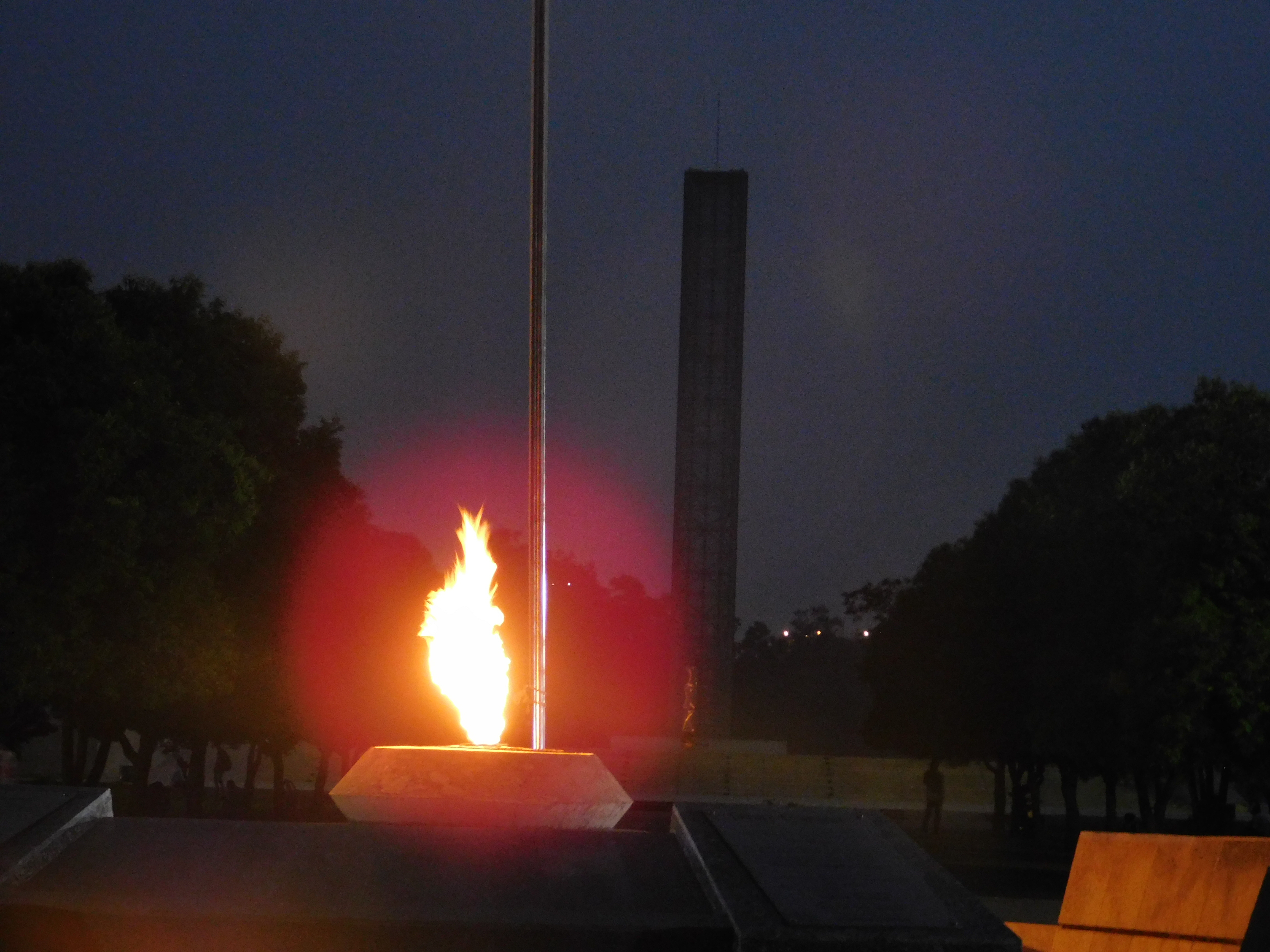 স্বাধীনতা স্তম্ভ